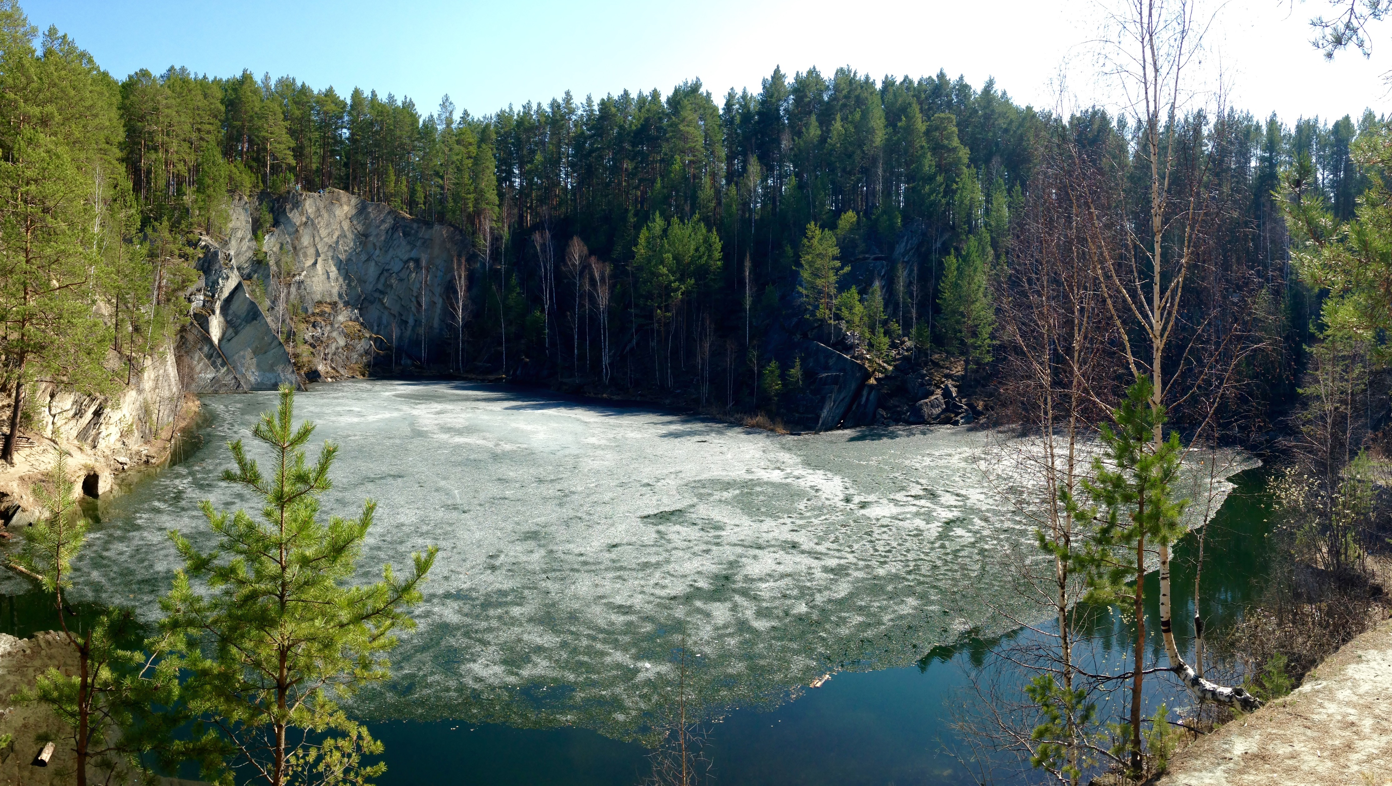 Озеро у скалы Тальковый Камень с окружающими лесами, Сысертский район. This image is related to the protected area of Russia number 6610635